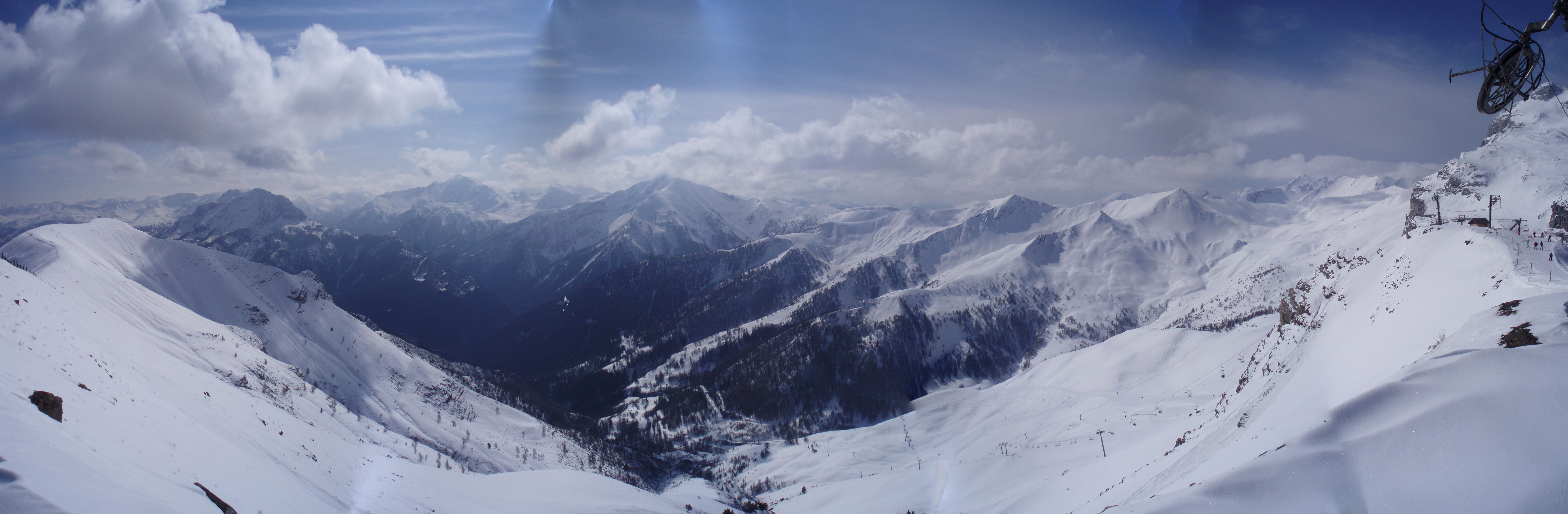 Panorama de Pra Loup